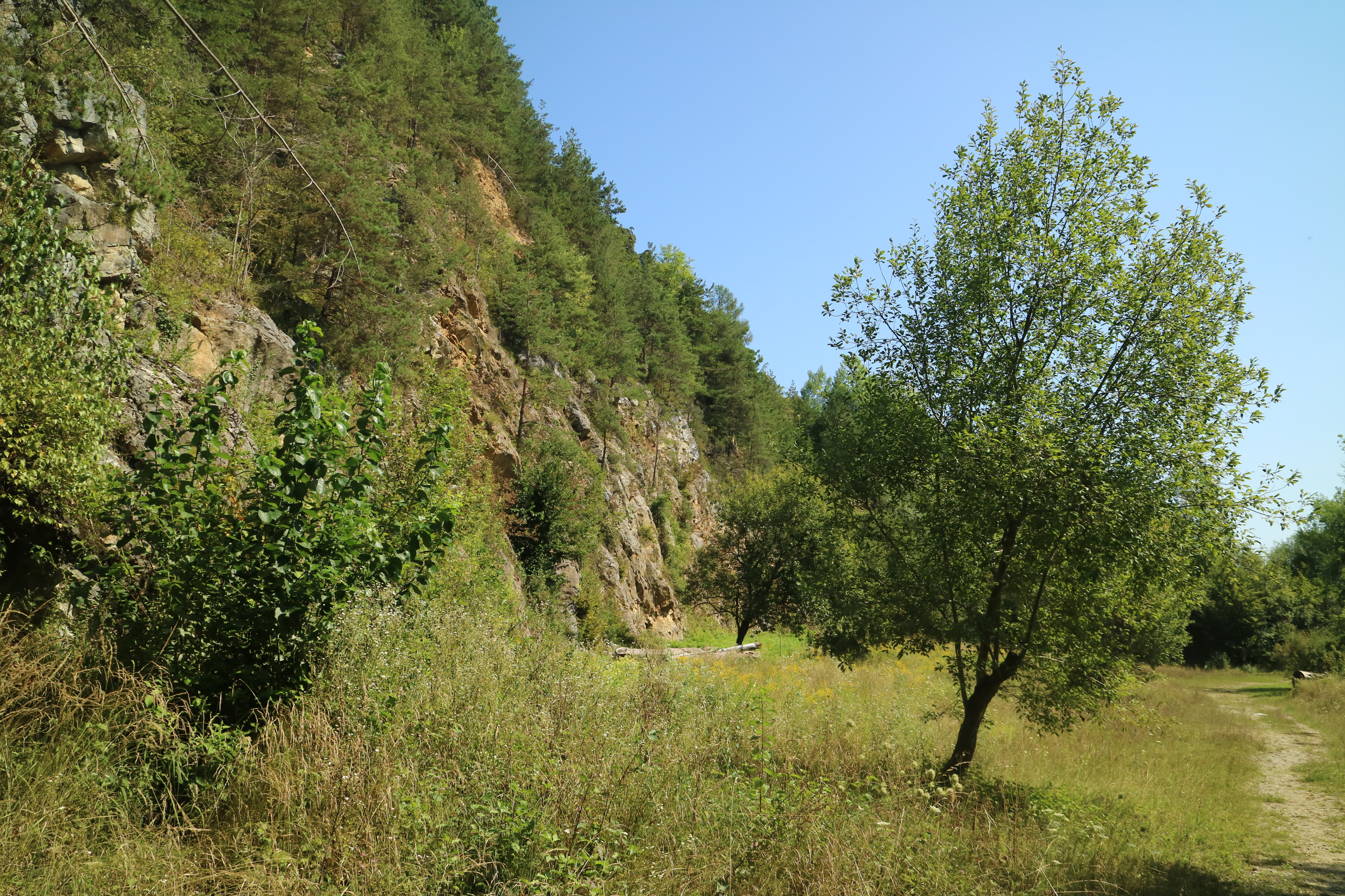 Steinbruch Hauenstein, Graz-Mariatrost